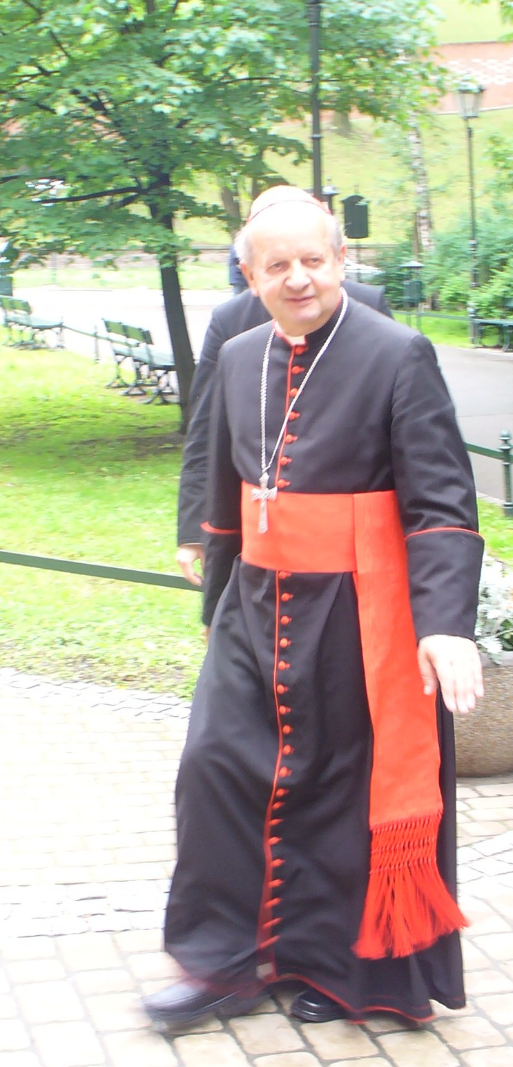 kardynał Stanisław Dziwisz